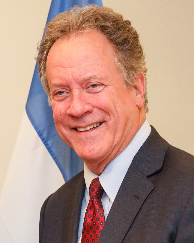 En su primera actividad en Italia, el presidente Alberto Fernández se reunió con el director ejecutivo del Programa Mundial de Alimentos de Naciones Unidas, David Beasley, en la sede del organismo que se encarga de llevar adelante el Plan Hambre Cero.